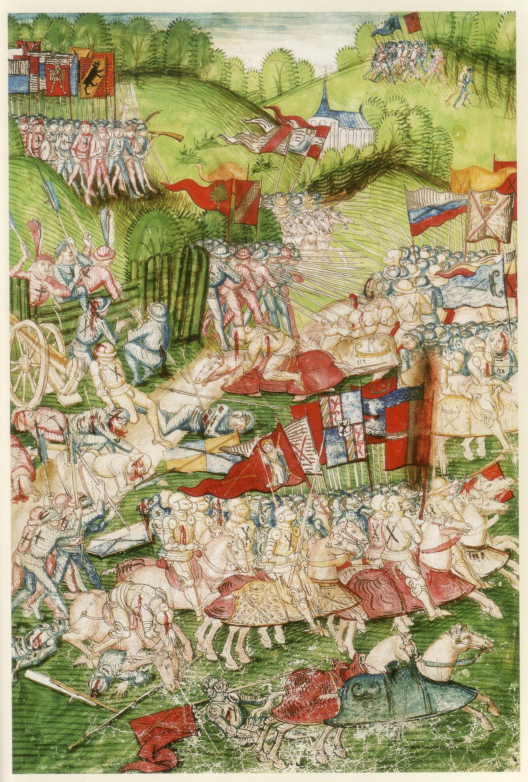 Murten-Schlacht 1476, Bern, Burgerbibliothek, Mss. Hist. Helv. I.3, S. 757